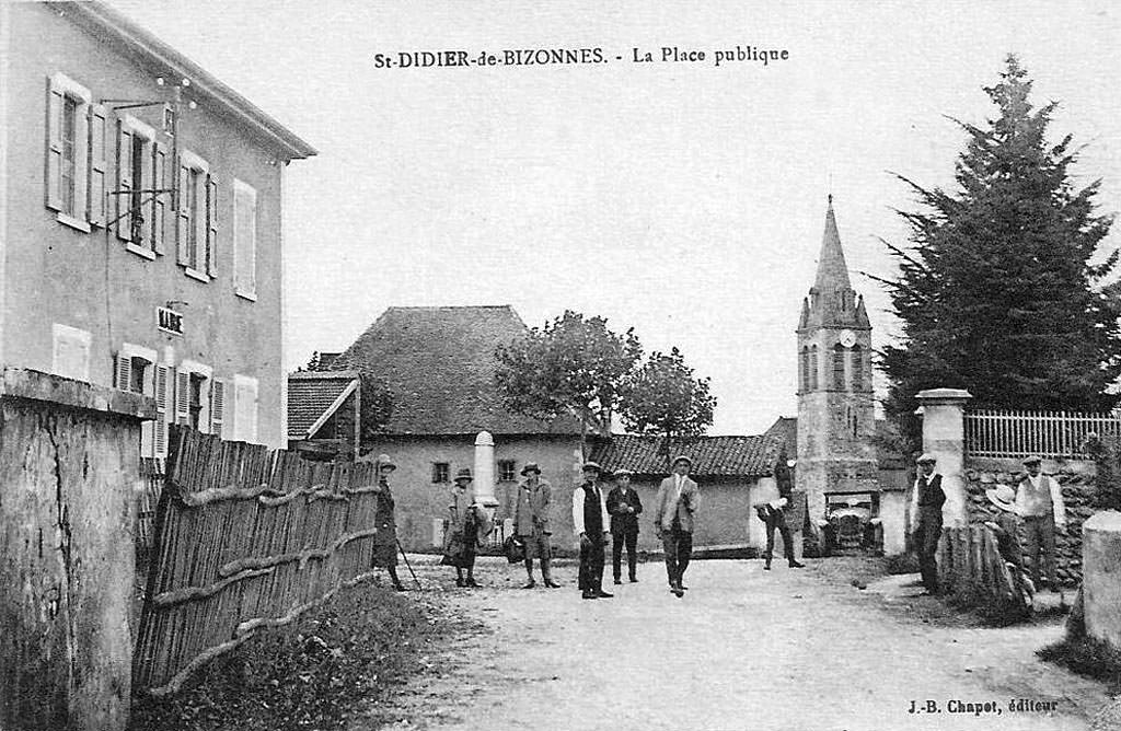 Saint-Didier-de-Bizonnes, la place du village. Carte postale ancienne.